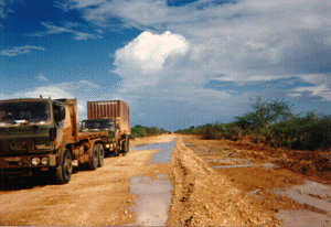 Convoi logistique sur les pistes de Somalie entre Hoddur et Baîdoa